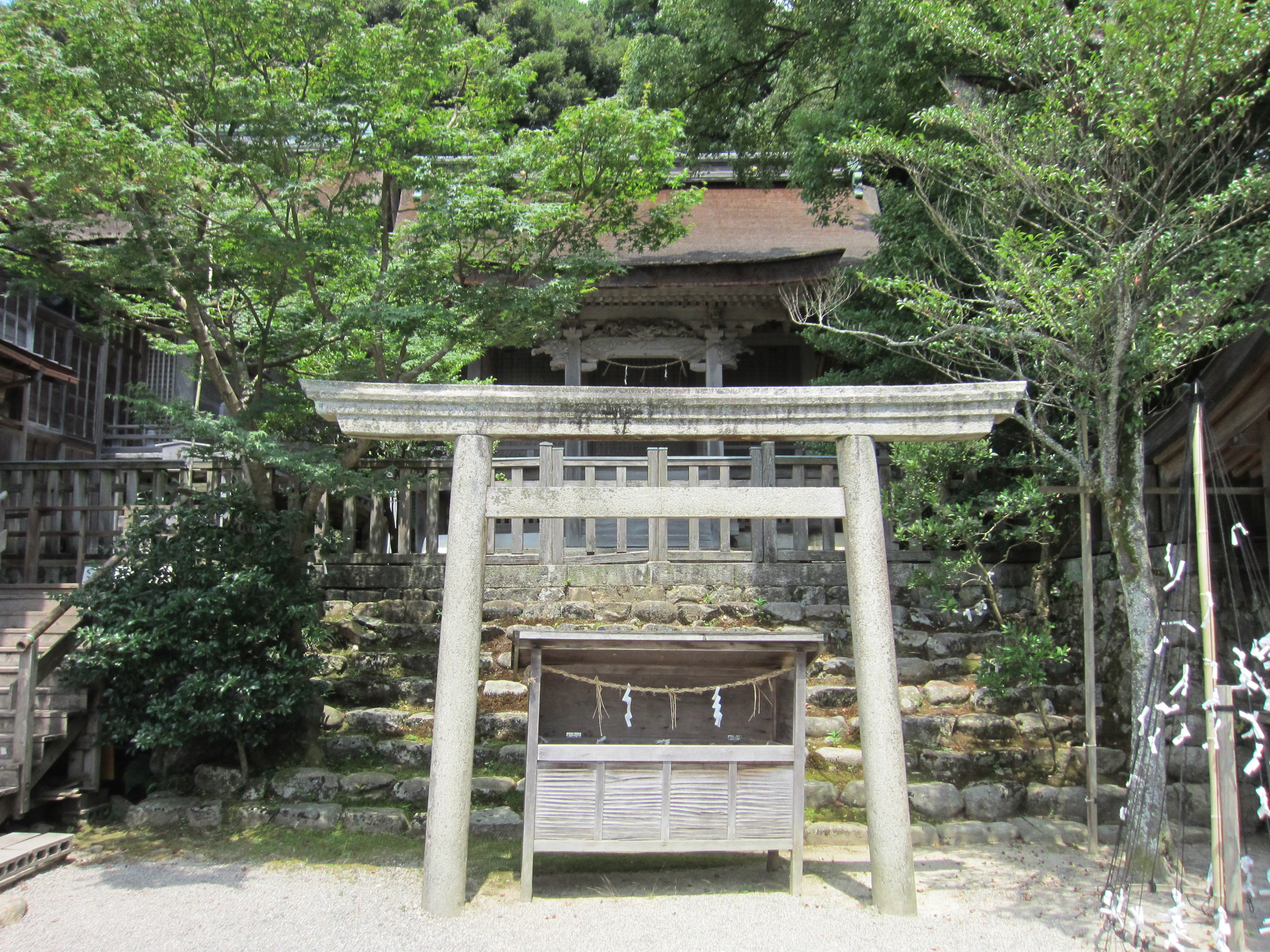 白山神社 (氣多大社摂社)